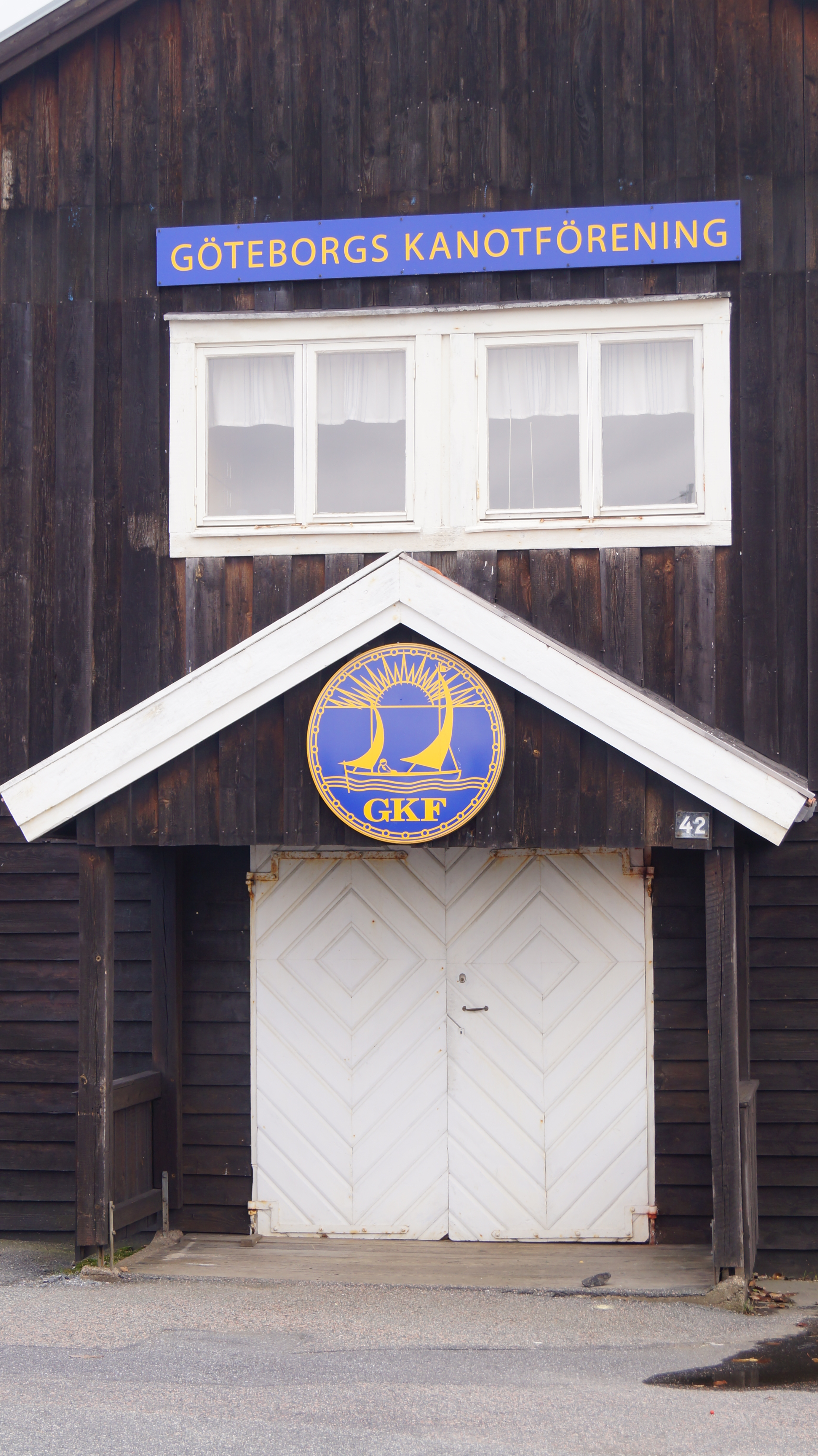 Göteborgs kanotförening (Älvsborg 855:405) Saltholmen